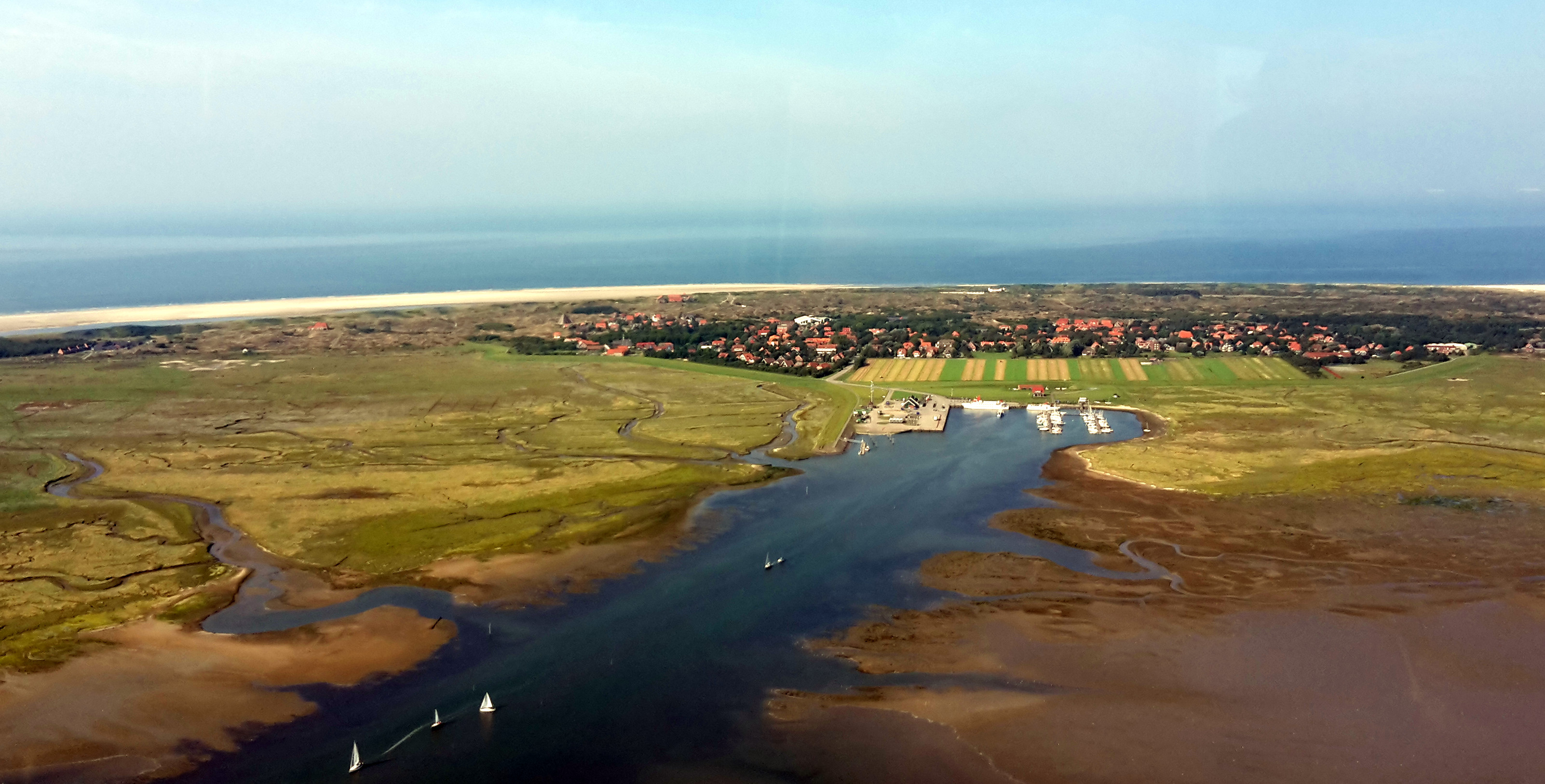 Luftbild von Spiekeroog mit Hafen aus Richtung Süden